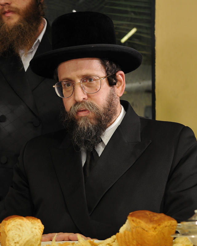 האדמו"ר מבויאן רישיון נוצר על ידי משתמש:Eli segal